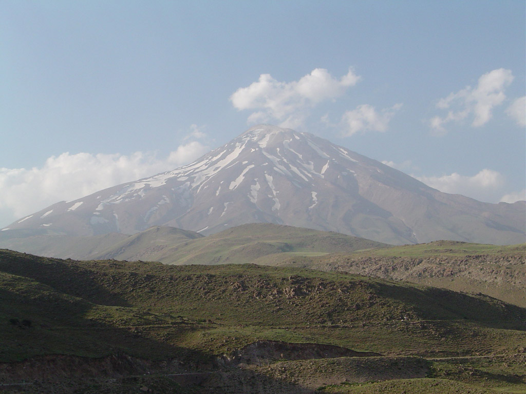 Damavand(5,610 meters).Damavand 1